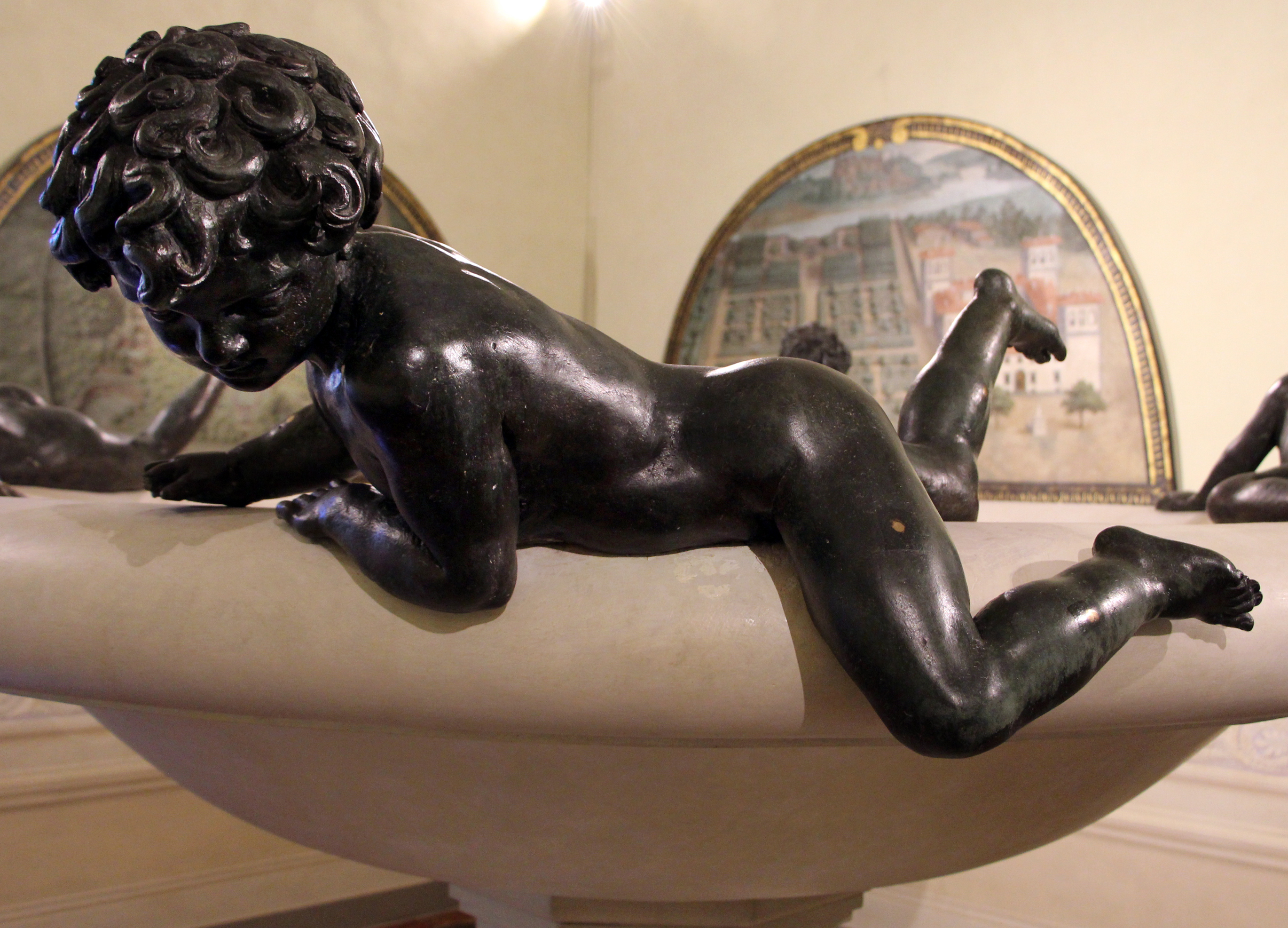 Villa medicea della Petraia - MIBAC The making of this document was supported by Wikimedia CH. (Submit your project!) For all the files concerned, please see the category Supported by Wikimedia CH. This is a photo of a monument which is part of cultural heritage of Italy.